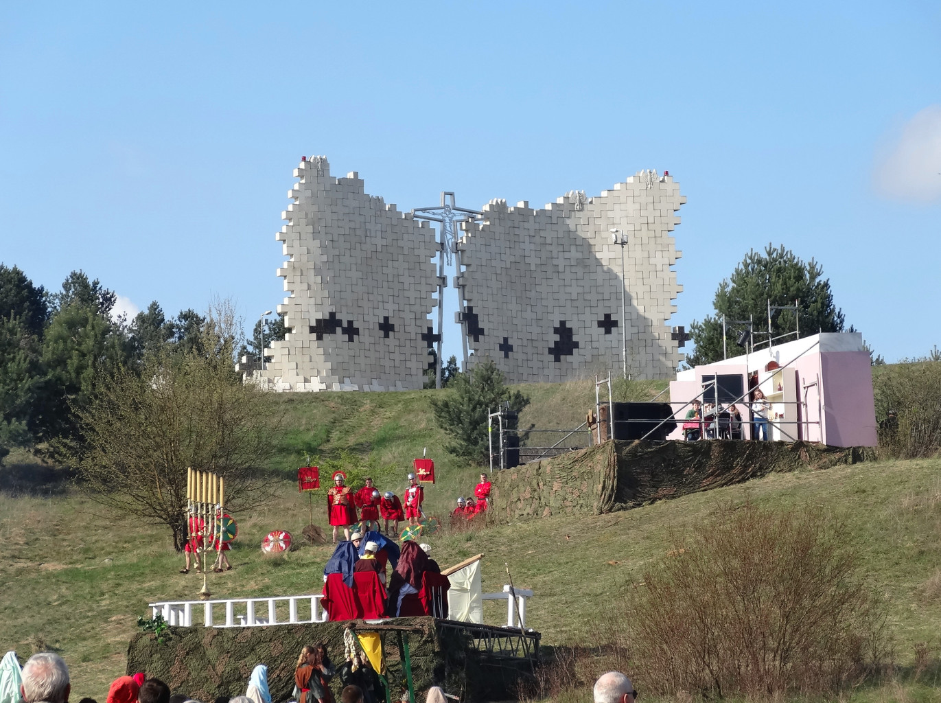 Misterium Męki Pańskiej w Dolinie Śmierci w Bydgoszczy 2014